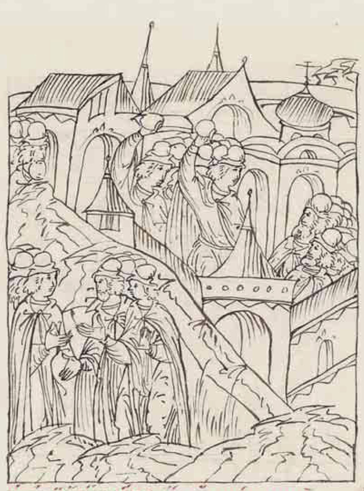 «Восстание в Москве в 1547 году. Миниатюра из Лицевого летописного свода. 16 век.